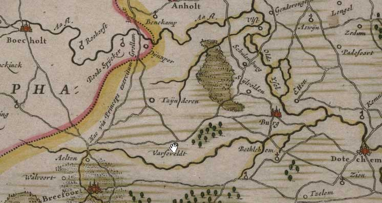 fragment van de kaart van het Graafschap Zutphen in de atlas van Blaeu